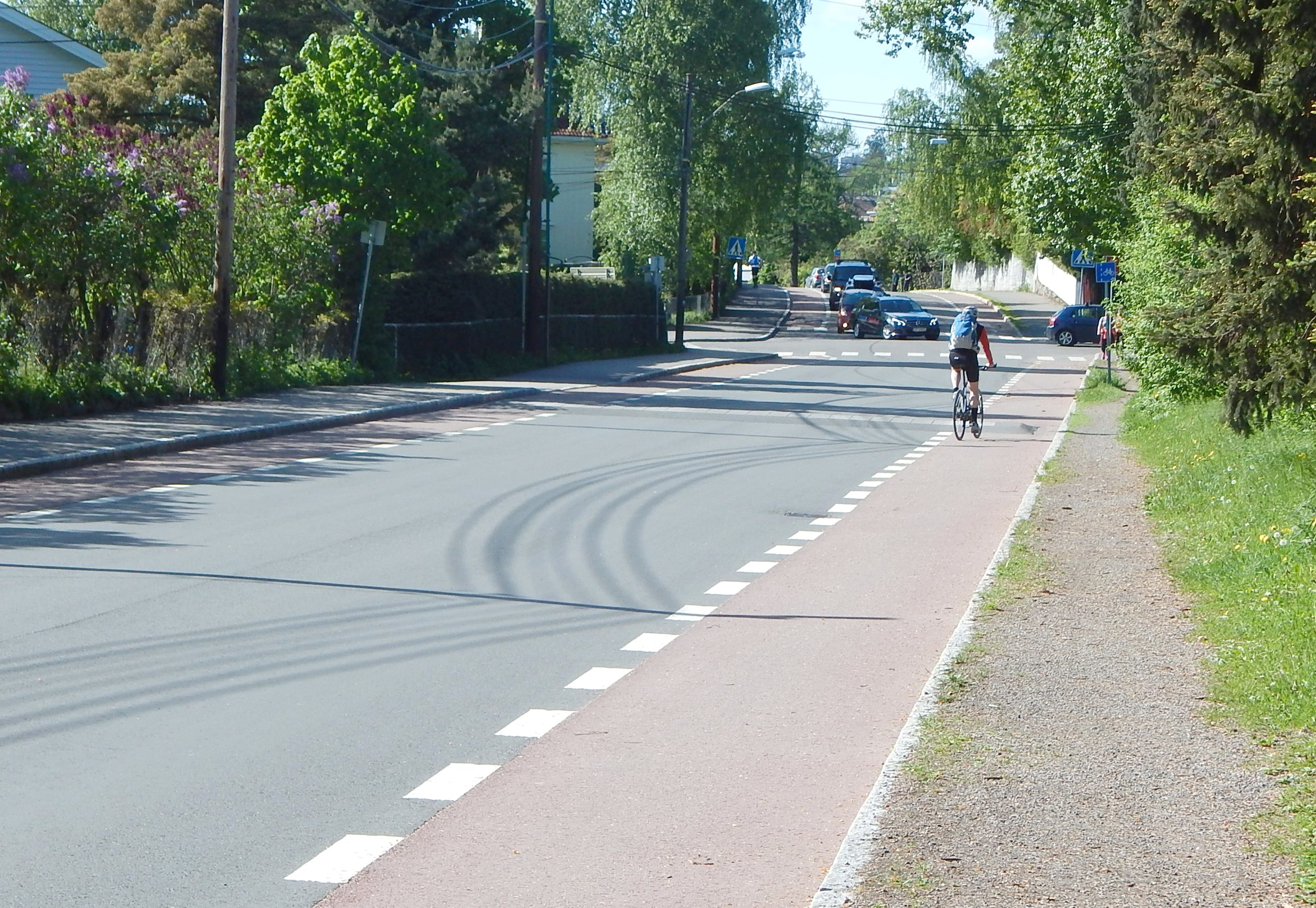 Monolitveien vestover ved Vestre gravlund